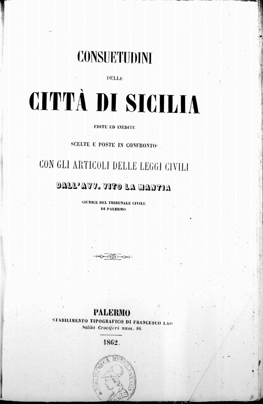 Frontespizio